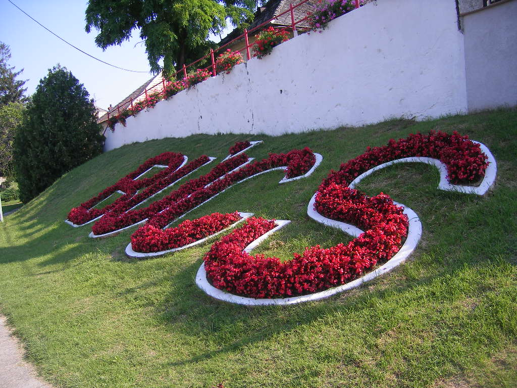 Búcs